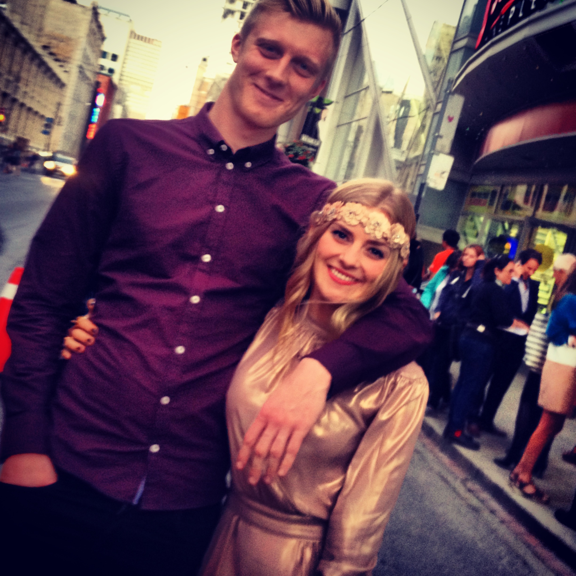 Toronto International Film Festival 2014